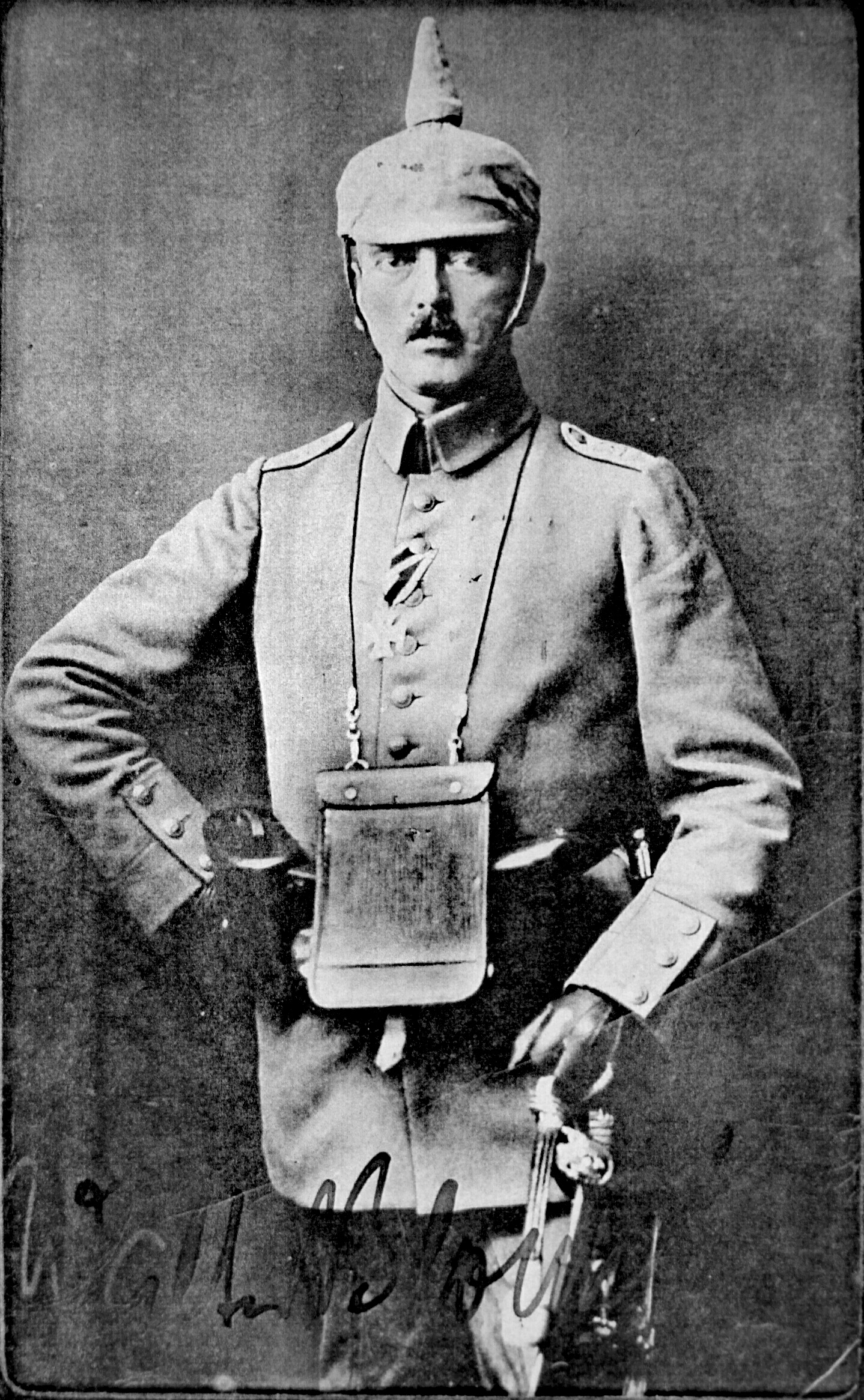 Walter Bloem als Hauptmann im Ersten Weltkrieg. Feldpostkarte, abgestempelt: Brüssel/Bruxelles 24.1.1915